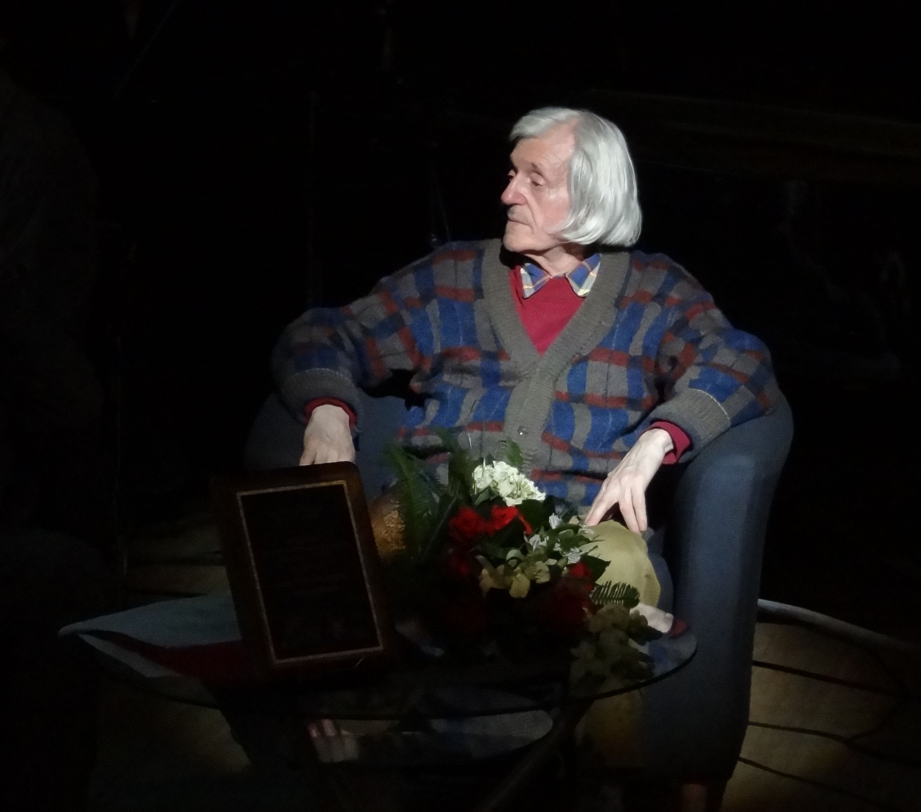 Лауреатом Российской национальной премии «Поэт» в 2011 году стал петербургский поэт Виктор Соснора. Это стало своеобразным подарком к юбилею поэта, которому 28 апреля исполнилось 75 лет.